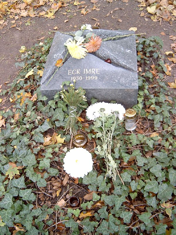 Eck Imre (1930-1999) táncos, koreográfus sírja Budapesten. Kerepesi temető: 42/1-A-26